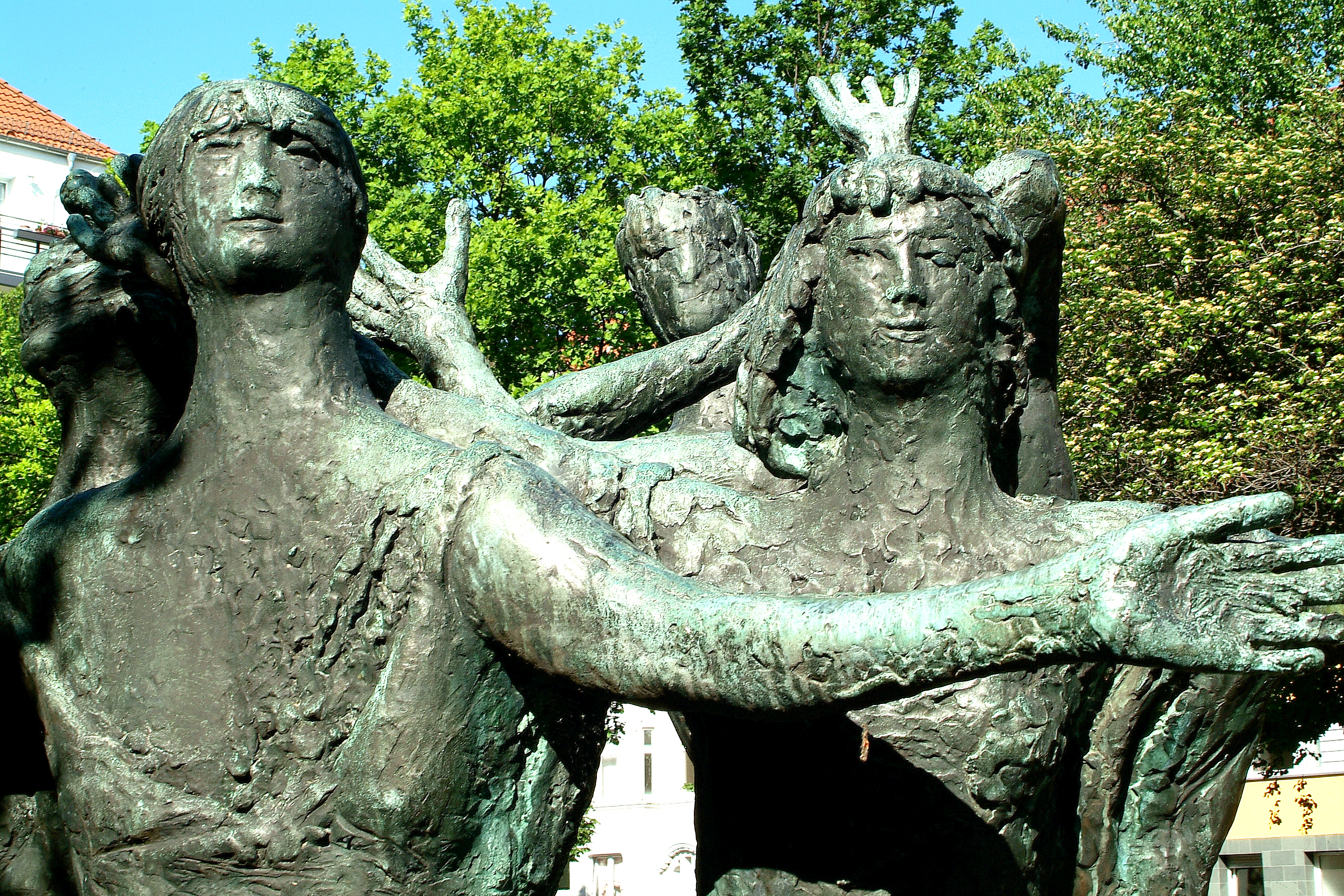 Details der Figurengruppe Die Freude von Dieter Läpple. Die Skulptur wurde von der Kunstgießerei "Ernst Strassacker GmbH & Co. KG gegossen und 1966 vor der (heutigen) Rosa-Parks-Schule in der Isernhagener Straße 33 in Hannover aufgestellt.